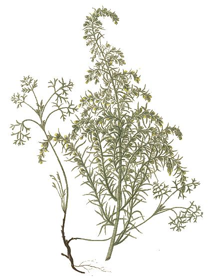 Asteraceae - Artemisia maritima